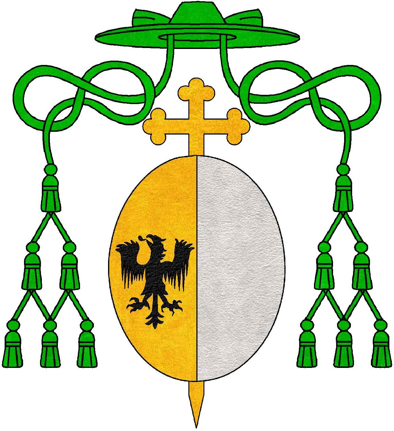 Stemma del vescovo Domenico de Dominici